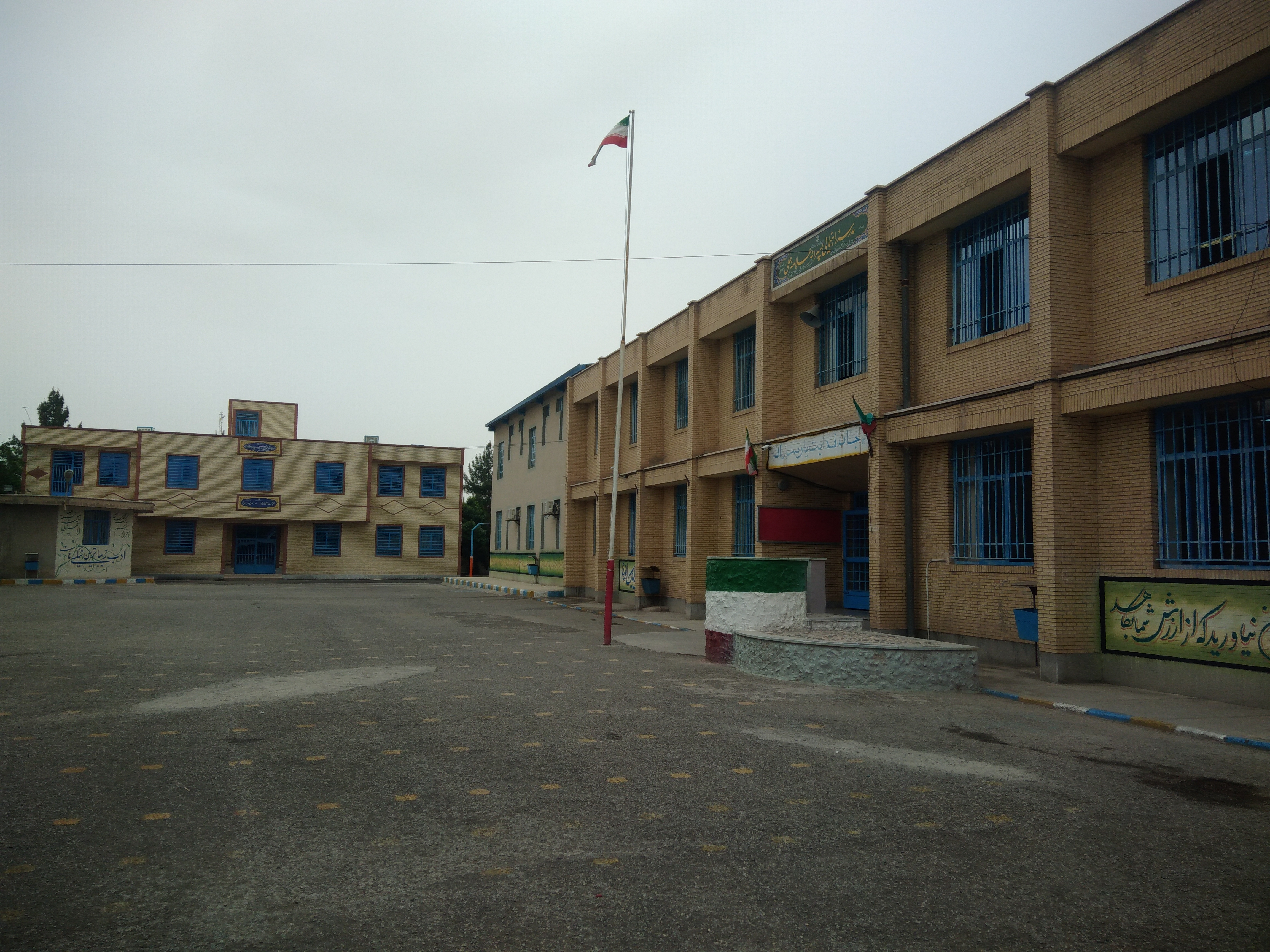 نمای ساختمان قدیمی